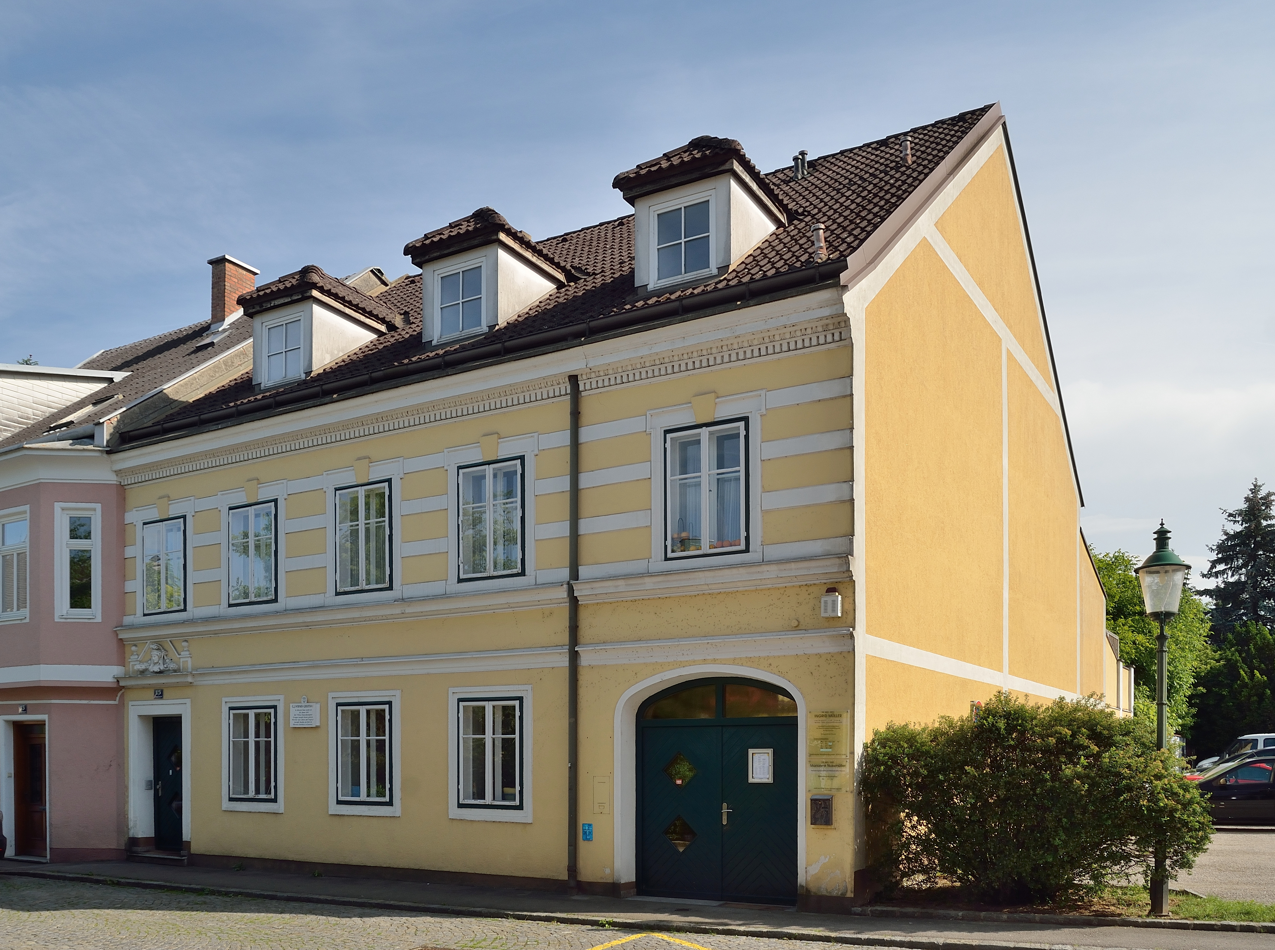 Geburtshaus von Gregor Joseph Werner in der Lange Gasse 15, Ybbs an der Donau